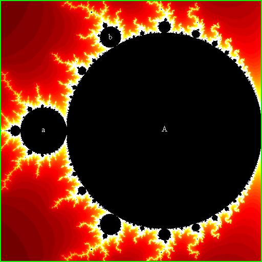 Imagen realizada por M.Romero Schmidkte ✉, especialmente para la Enciclopedia Libre y para la Wikipedia.